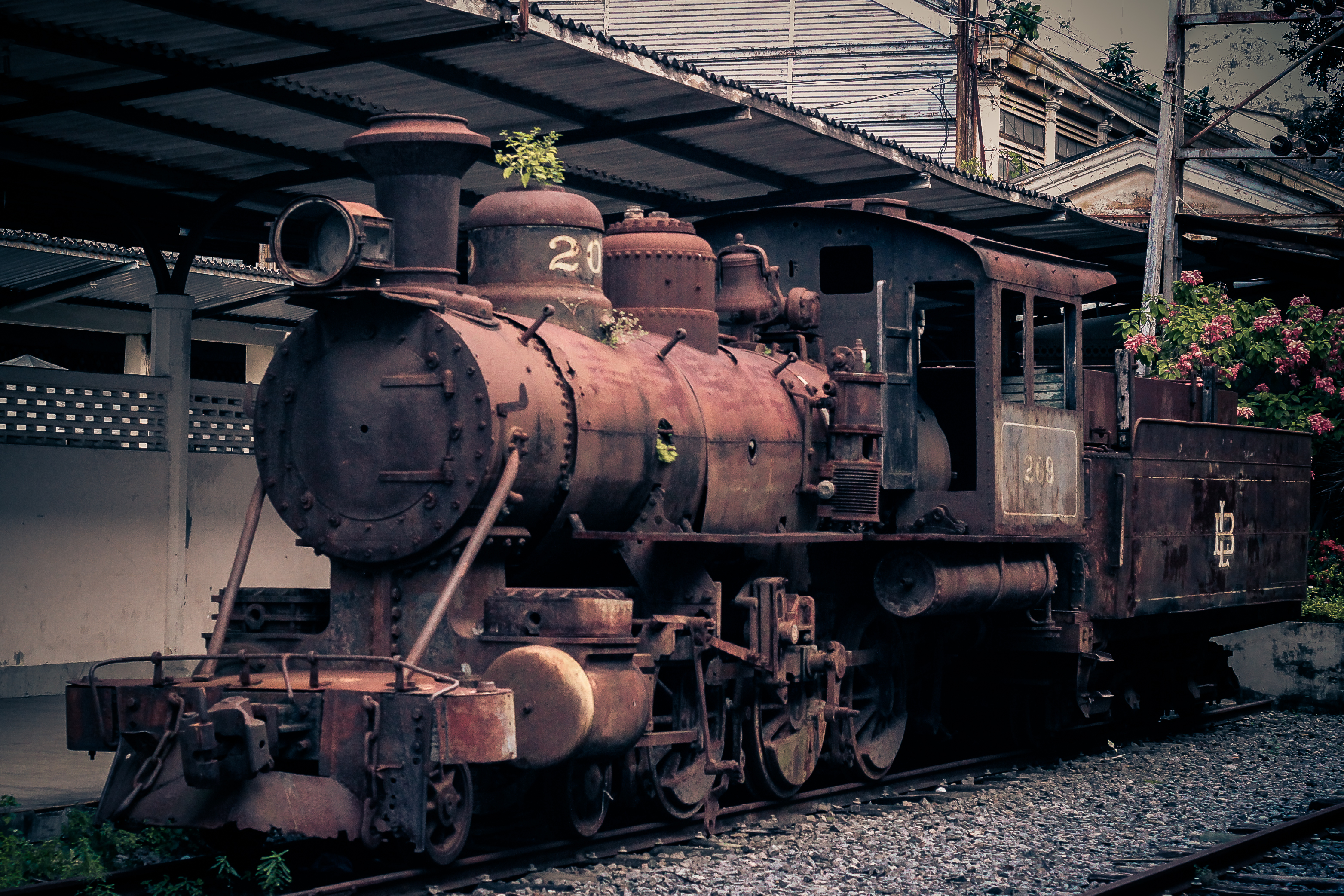 Local.: Estação Ferroviária do Subúrbio de Salvador - BA Cidade.: Salvador Copyright © Deo Araújo. Todos os direitos reservados Facebook | Blogger | Twitter | Instagram | deoaraujo89